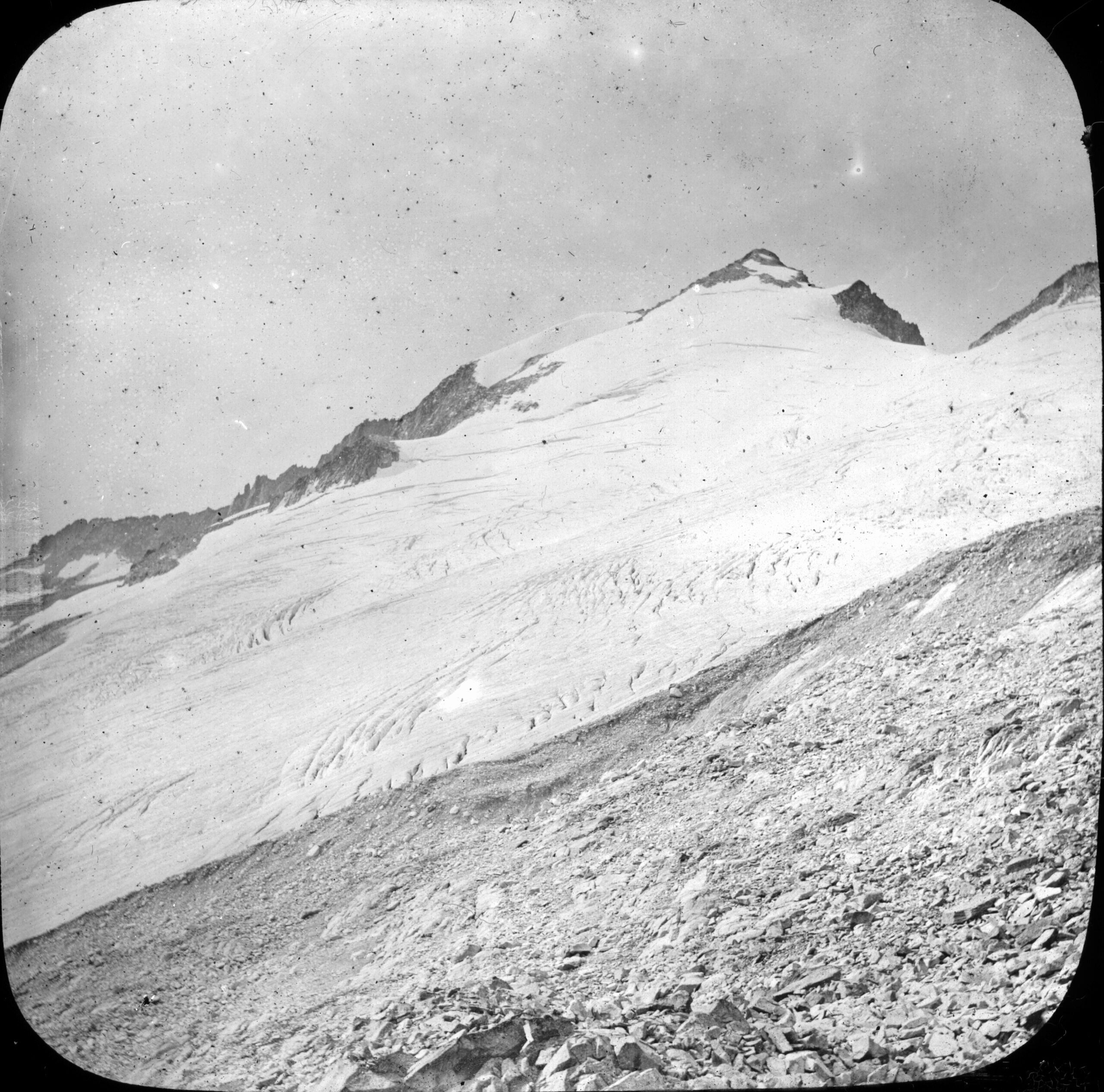 Fonds Trutat - Photographie ancienne Cote : TRU C 255 Localisation : Fonds ancien Original non communicable Titre : Glacier et pic du Néthou Auteur : Trutat, Eugène Rôle de l’auteur : Photographe Lieu de création : Ribagorza (Huesca ; comarque) Date de création : : 1859-1910 [entre] Mesures : 9 x 10 cm Mot(s)-clé(s) : -- Crête (montagne) -- Pic (montagne) -- Roche -- Pierre -- Glacier -- Ribagorza (Huesca ; comarque) -- Maladeta, Massif de la (Espagne) -- Montes Malditos (Espagne) -- Aneto (Espagne ; pic) -- Aneto (Espagne ; glacier) -- Esera (Espagne ; haute vallée) -- 19e siècle, 2e moitié -- 20e siècle, 1e quart Médium : Photographies -- Noir et blanc -- Positifs au collodion sur plaque de verre -- Paysages de montagne Bibliothèque de Toulouse. Domaine public